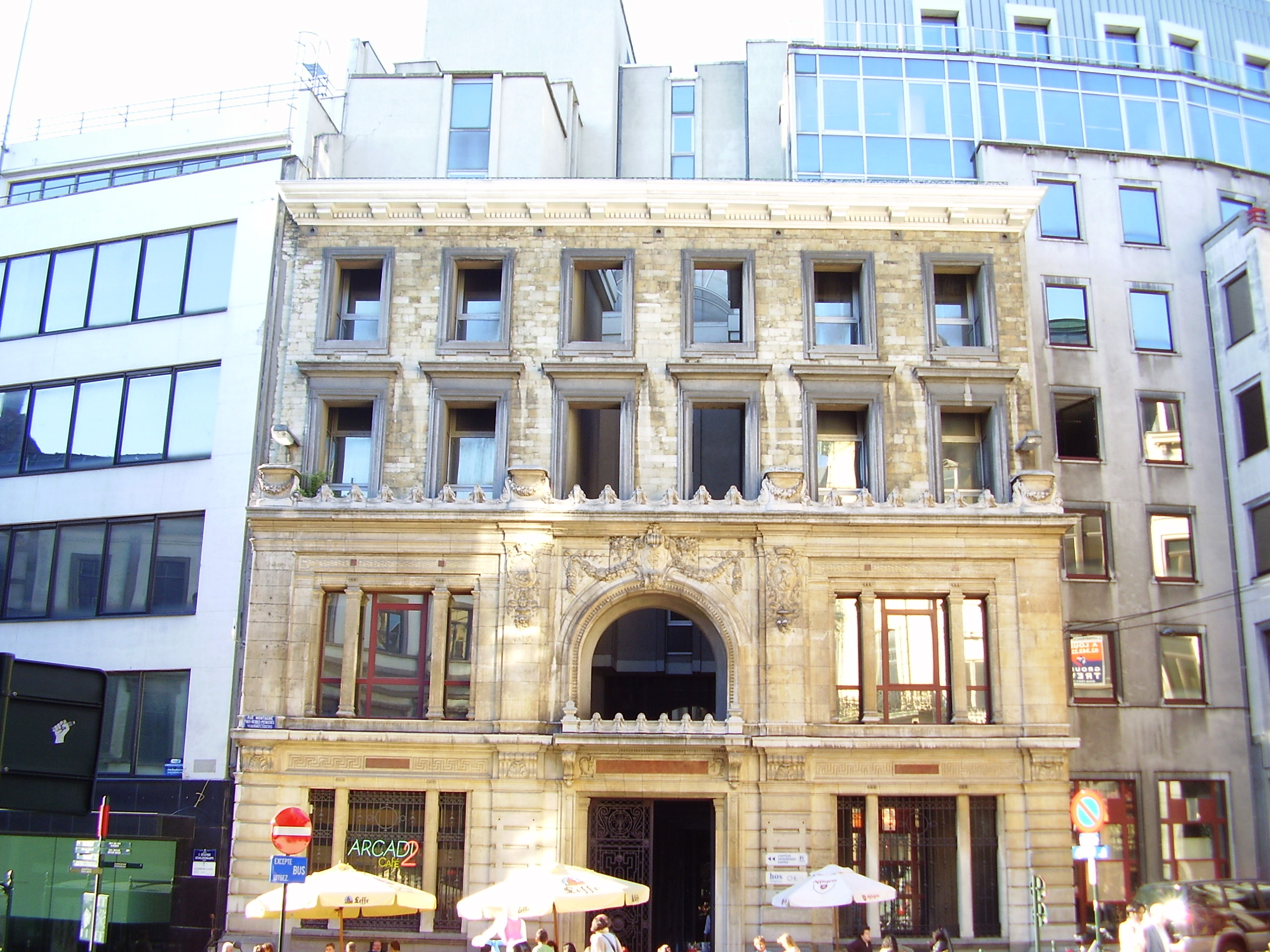 Rue Montagne-aux-Herbes-Potagères 2, Bruxelles, Belgique. Immeuble de 1864, remanié par Paul Saintenoy en 1905. Exemple de façadisme en plein centre de Bruxelles : seule une façade-écran subsiste devant un immeuble de 1985